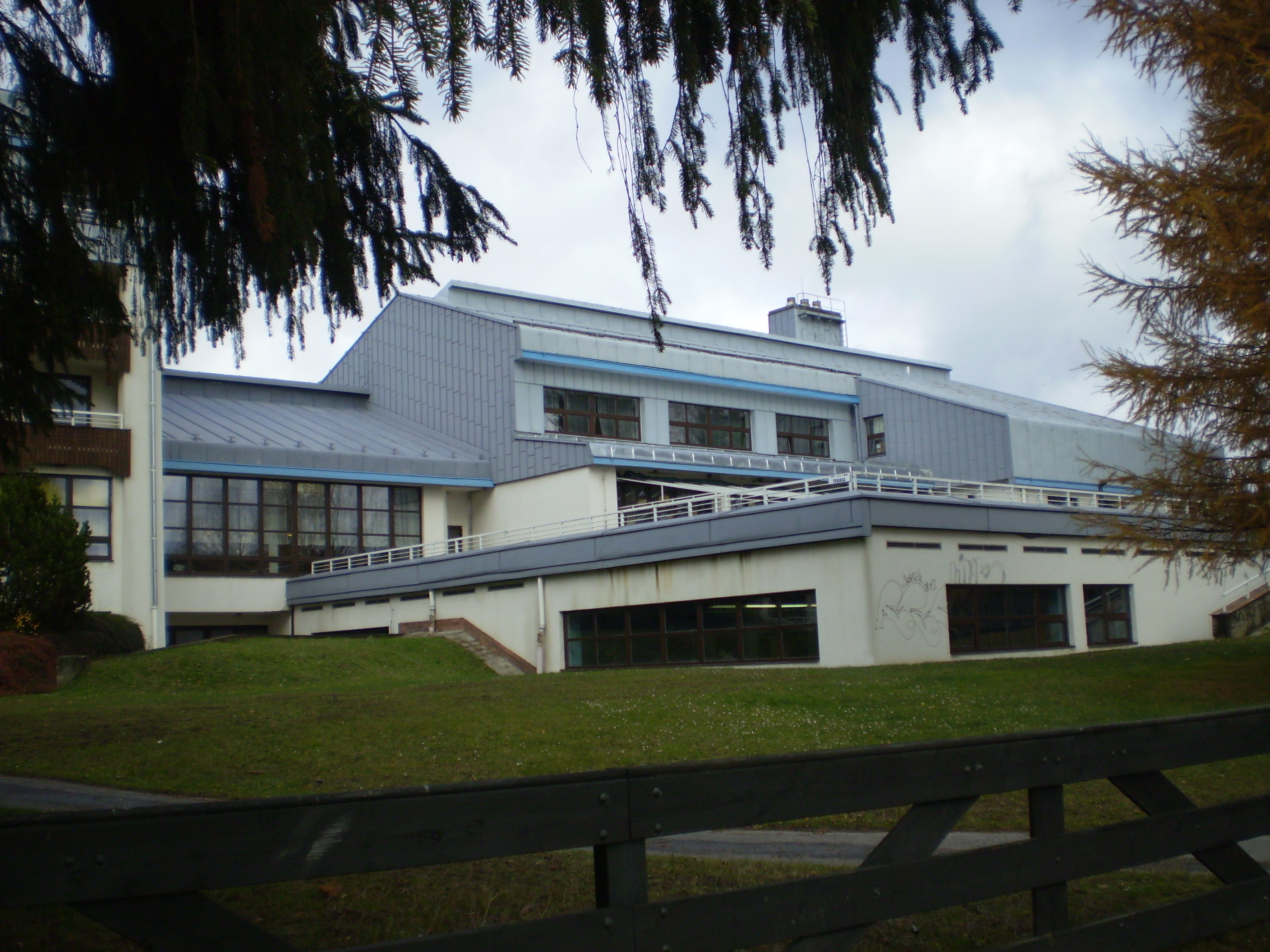 Hotel Devět skal u rybníka v obci Milovy